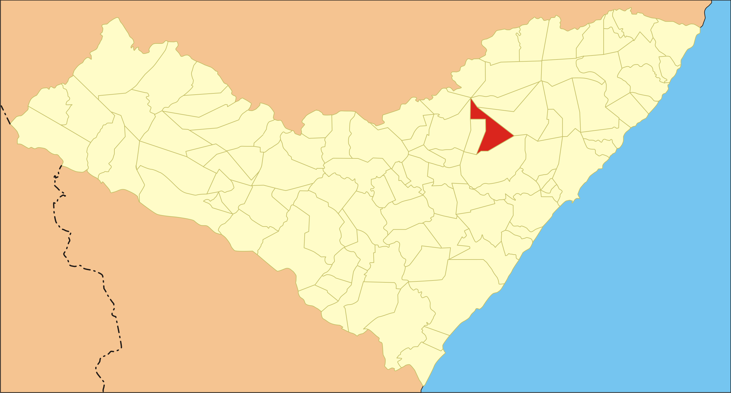 Localização da cidade em Alagoas